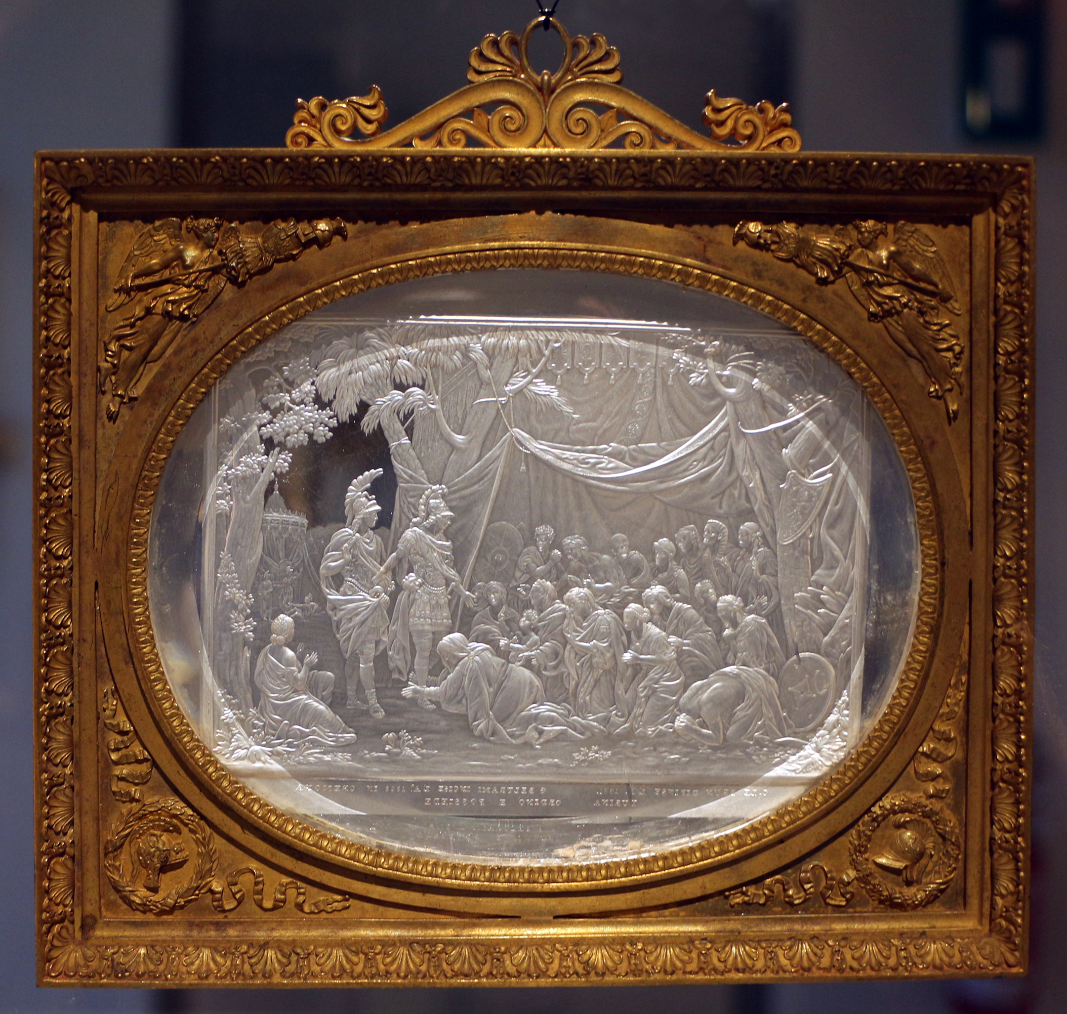 Palazzo Ala Ponzone This is a photo of a monument which is part of cultural heritage of Italy.